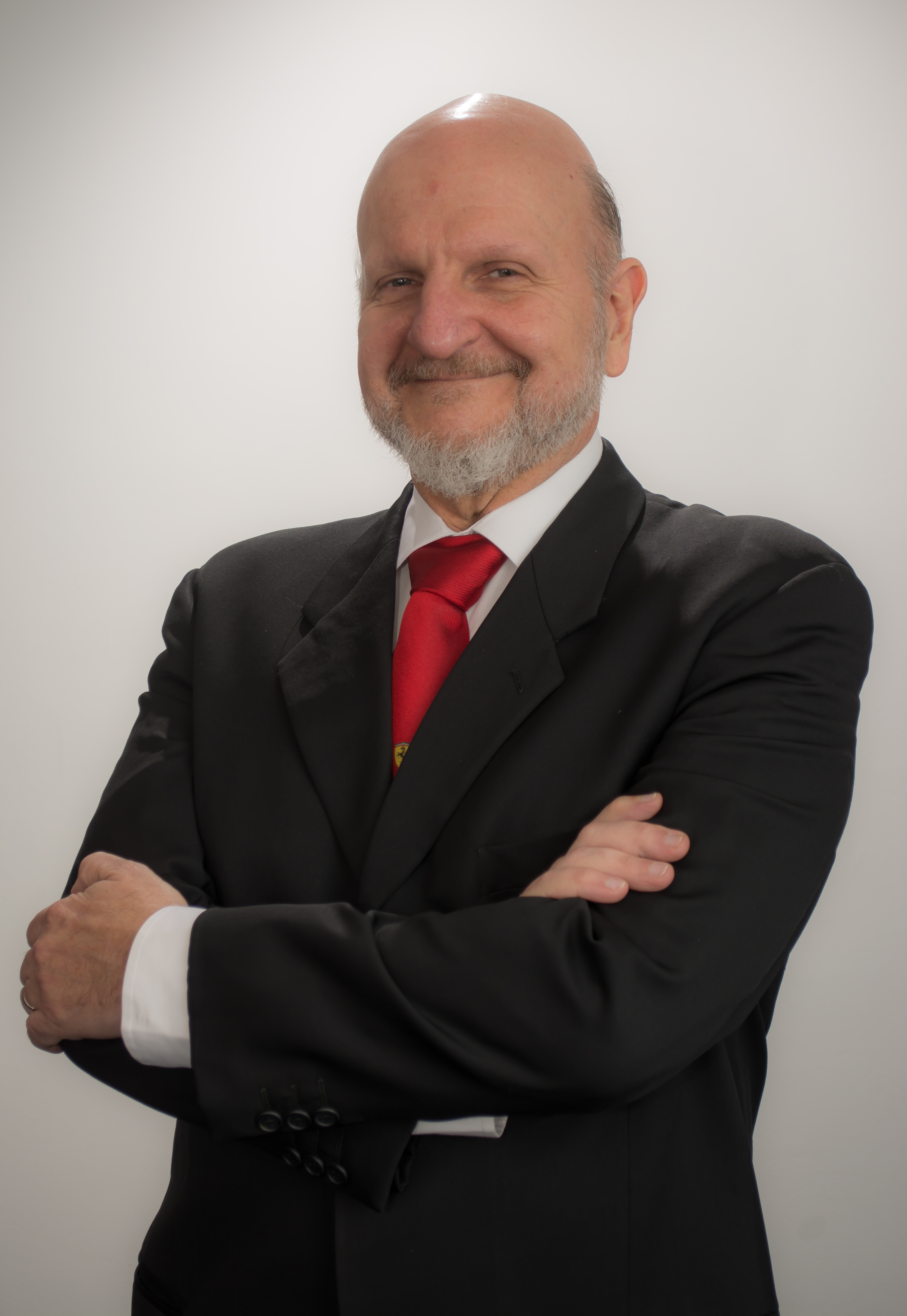 Giovanni Ferrari, Gerente de la Zona Libre de Colón, desde el 2 de julio de 2019. Con más de 30 años como empresario del sector farmacéutico de la Zona Libre de Colón, es designado por el Presidente de la República de Panamá, Laurentino Cortizo como Gerente de la zona franca del Atlántico panameño.